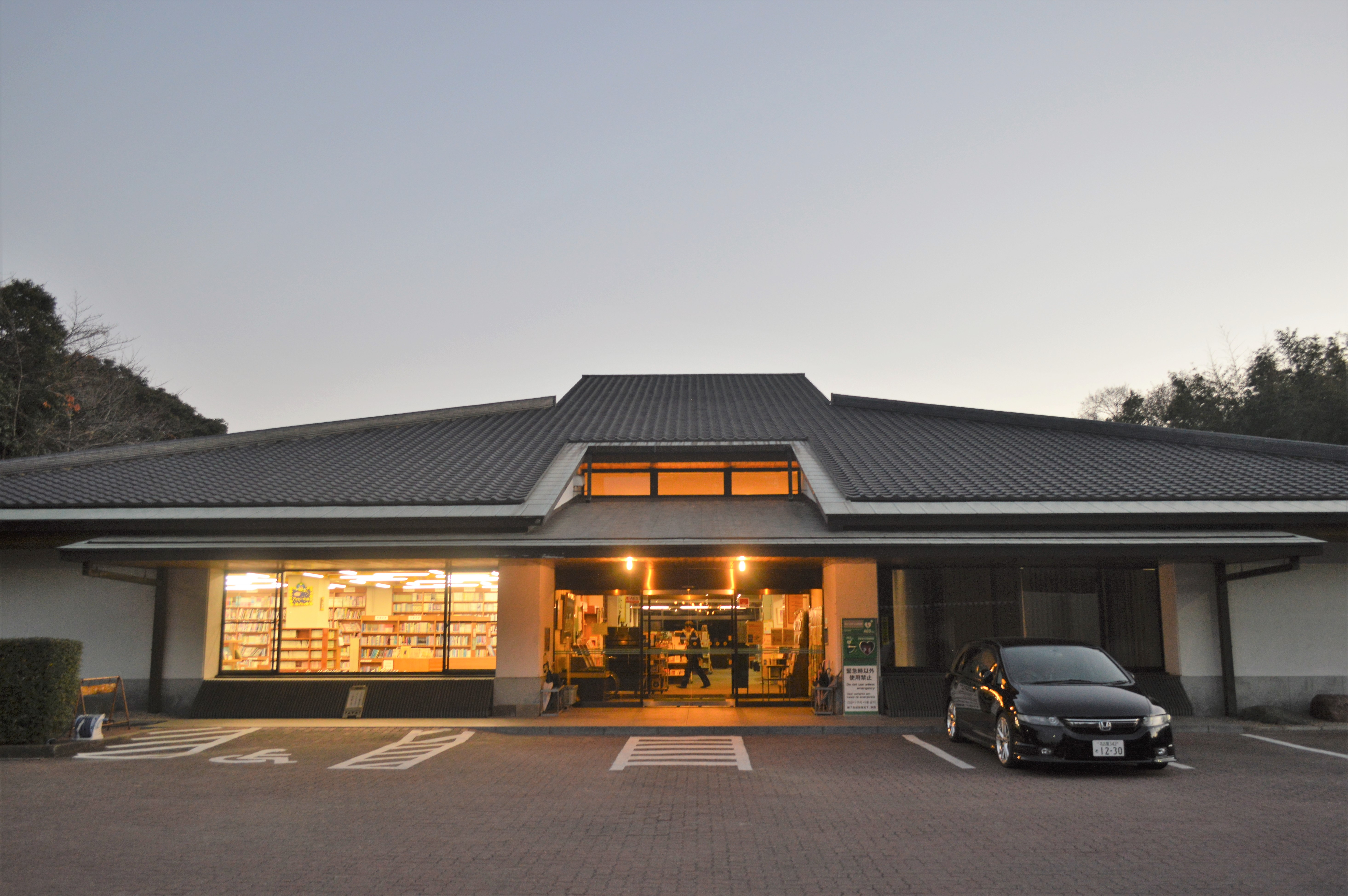 愛知県知多郡阿久比町にある阿久比町立図書館。